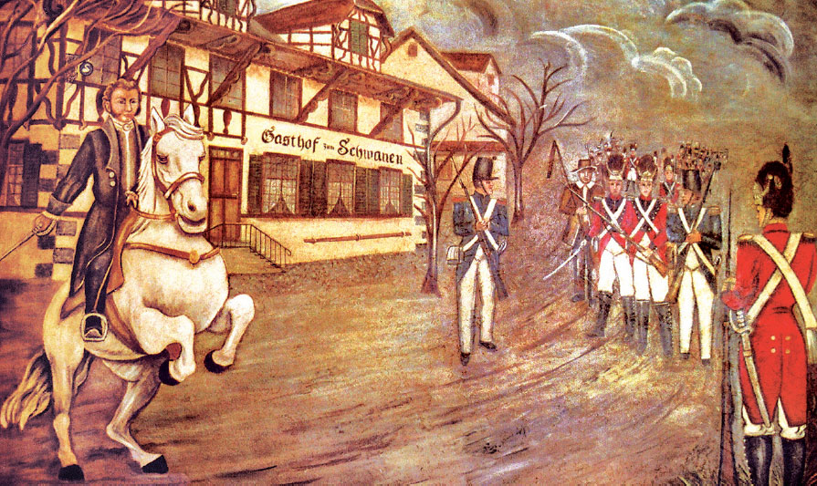 Freiämtersturm - Heinrich Fischer sammelt am Morgen des 5. Dezember 1830 vor seinem Wirtshaus die ersten Freiwilligen für den Zug nach Aarau ((Wandbild im Restaurant Schwanen, Merenschwand).